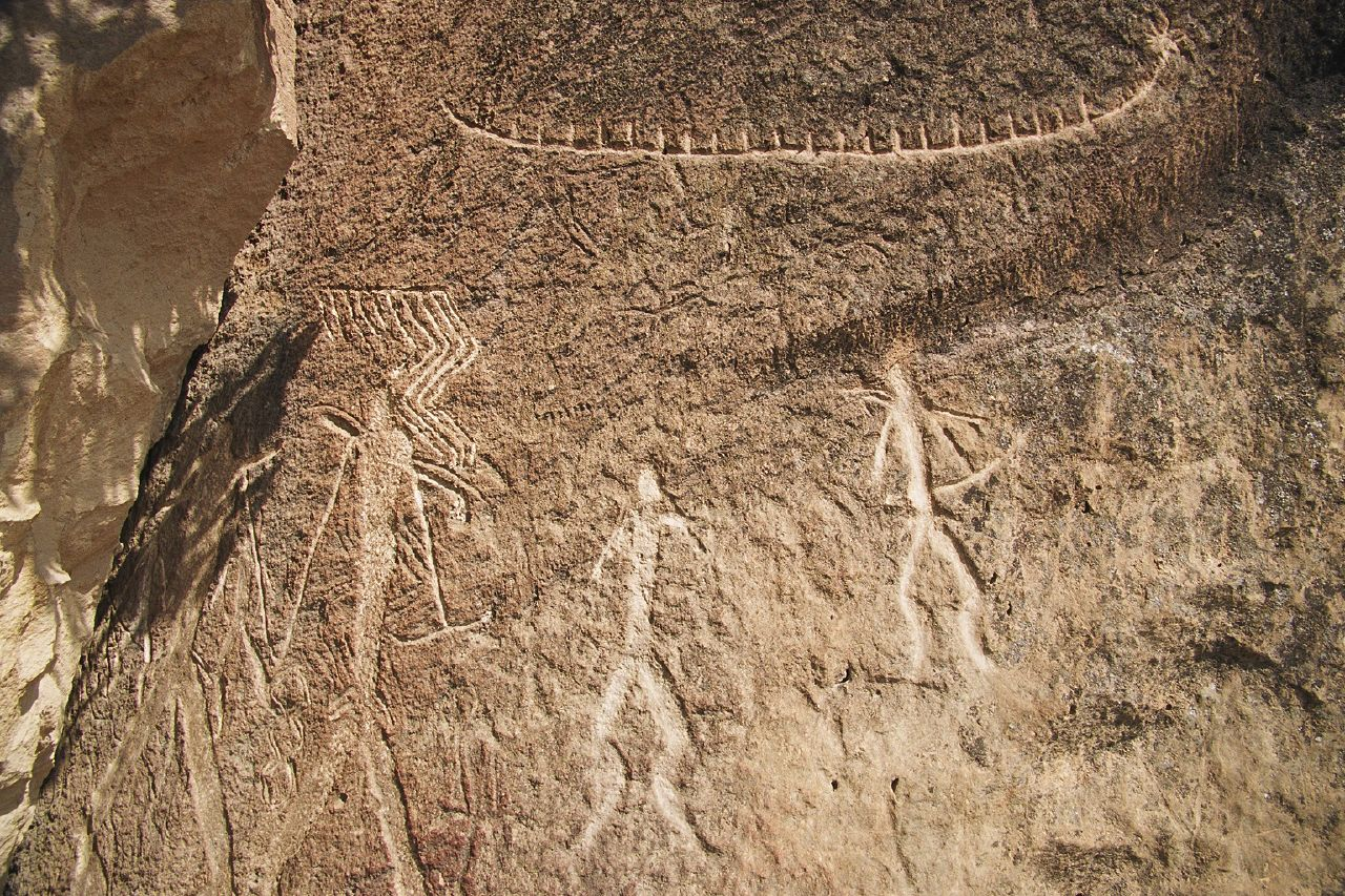 Qobustan, Azerbaijan